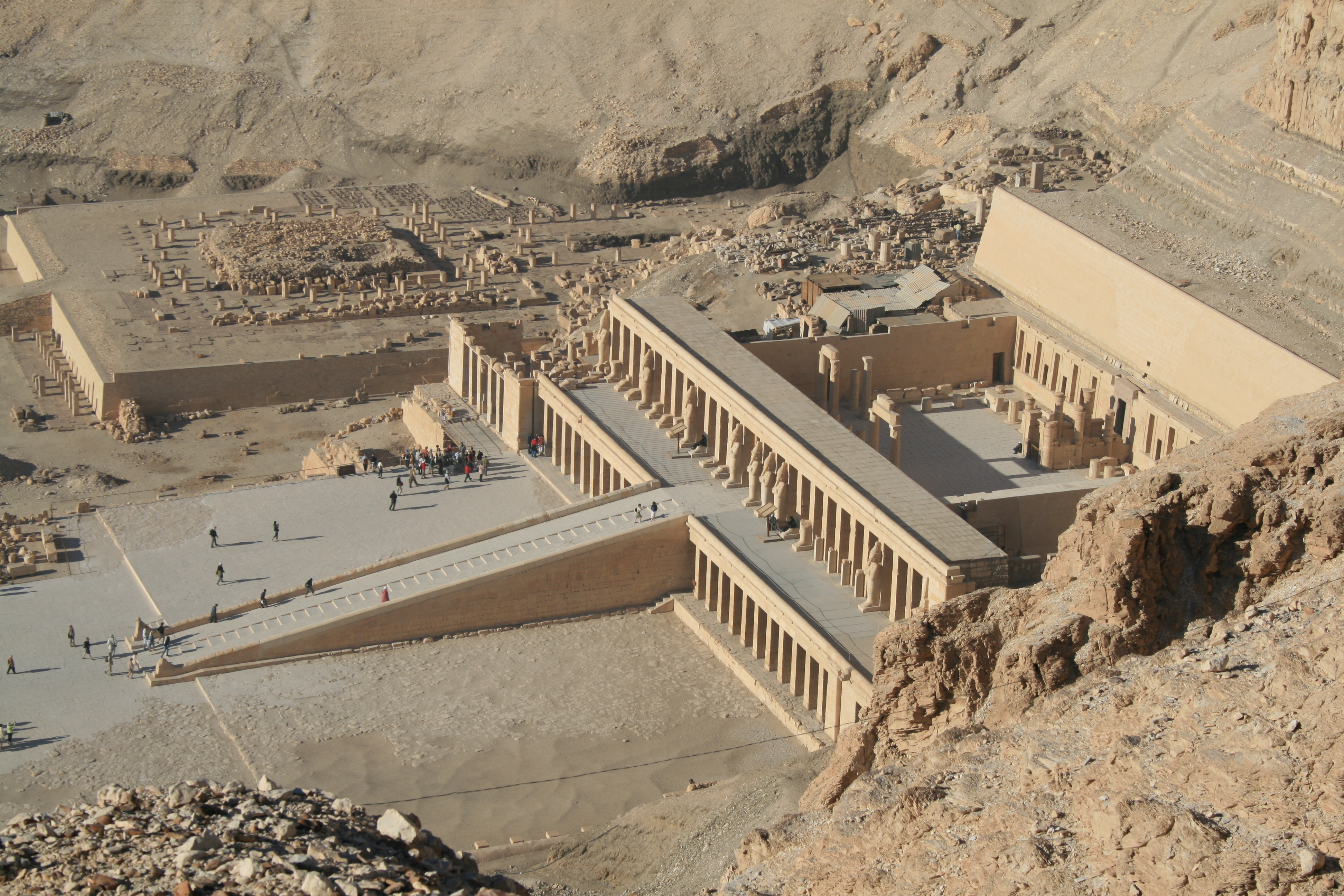 Deir el-Bahari avec le temple d'Hatchepsout, le temple de Thoutmosis III et le temple de Montouhotep II, Égypte en arrière-plan, ruines du temple de Montouhotep